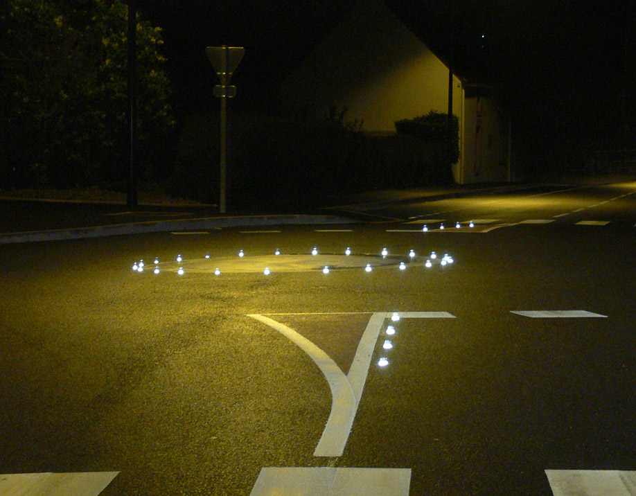 Cette photographie prise à Auray dans le Morbihan en France en 2006 illustre l'efficacité des dispositifs rétroréfléchissants pour la sécurité routière. Ce dispositif peu coûteux est efficace et a une contribution à la pollution lumineuse qui semble proche de zéro.